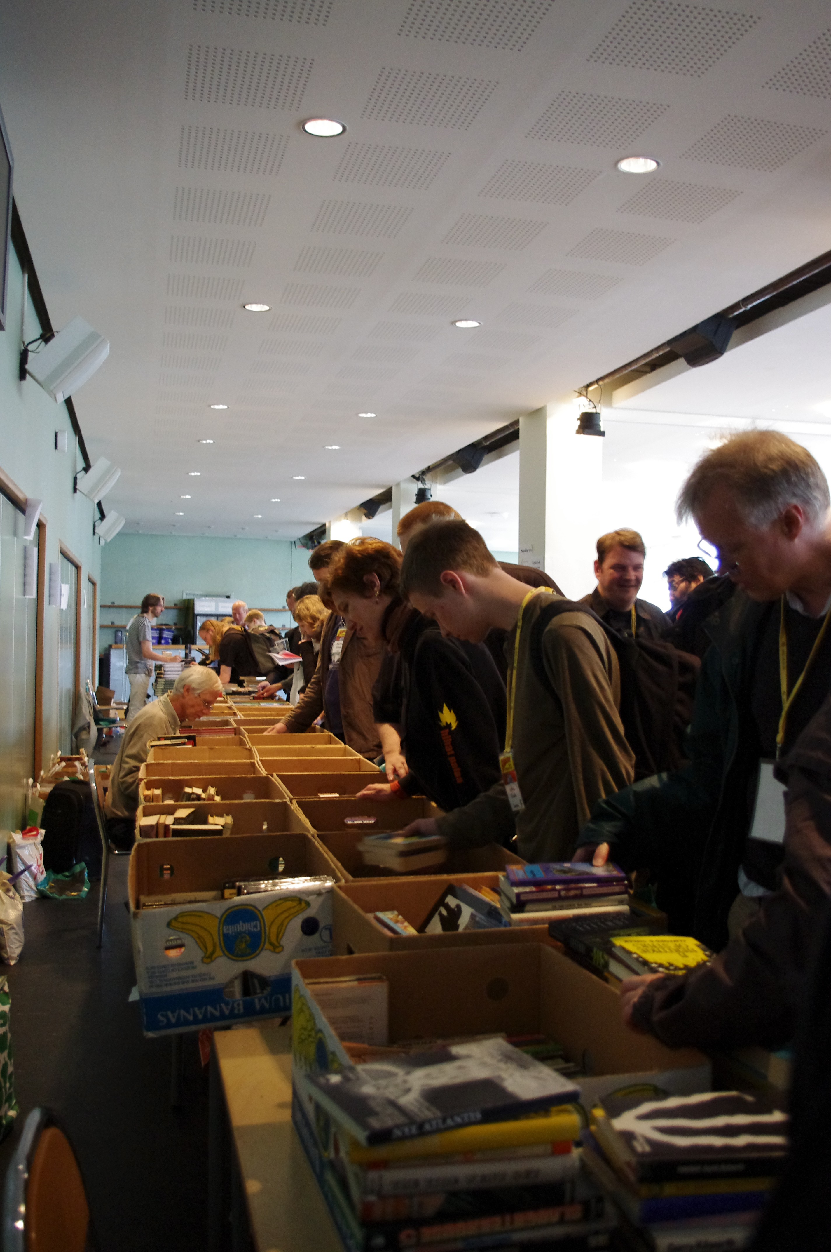 Mats Linder säljer böcker för Alvarfondens antikvariat på Eurocon i Stockholm 2011.